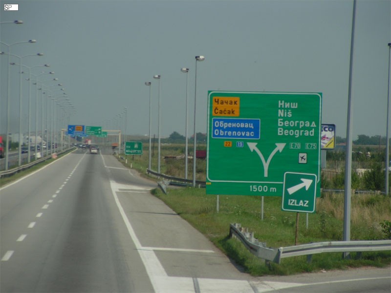 Panneau de signalisation serbe